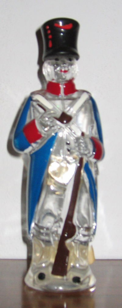 Lipper Schütze aus Lemgo, Kreis Lippe, Nordrhein-Westfalen.